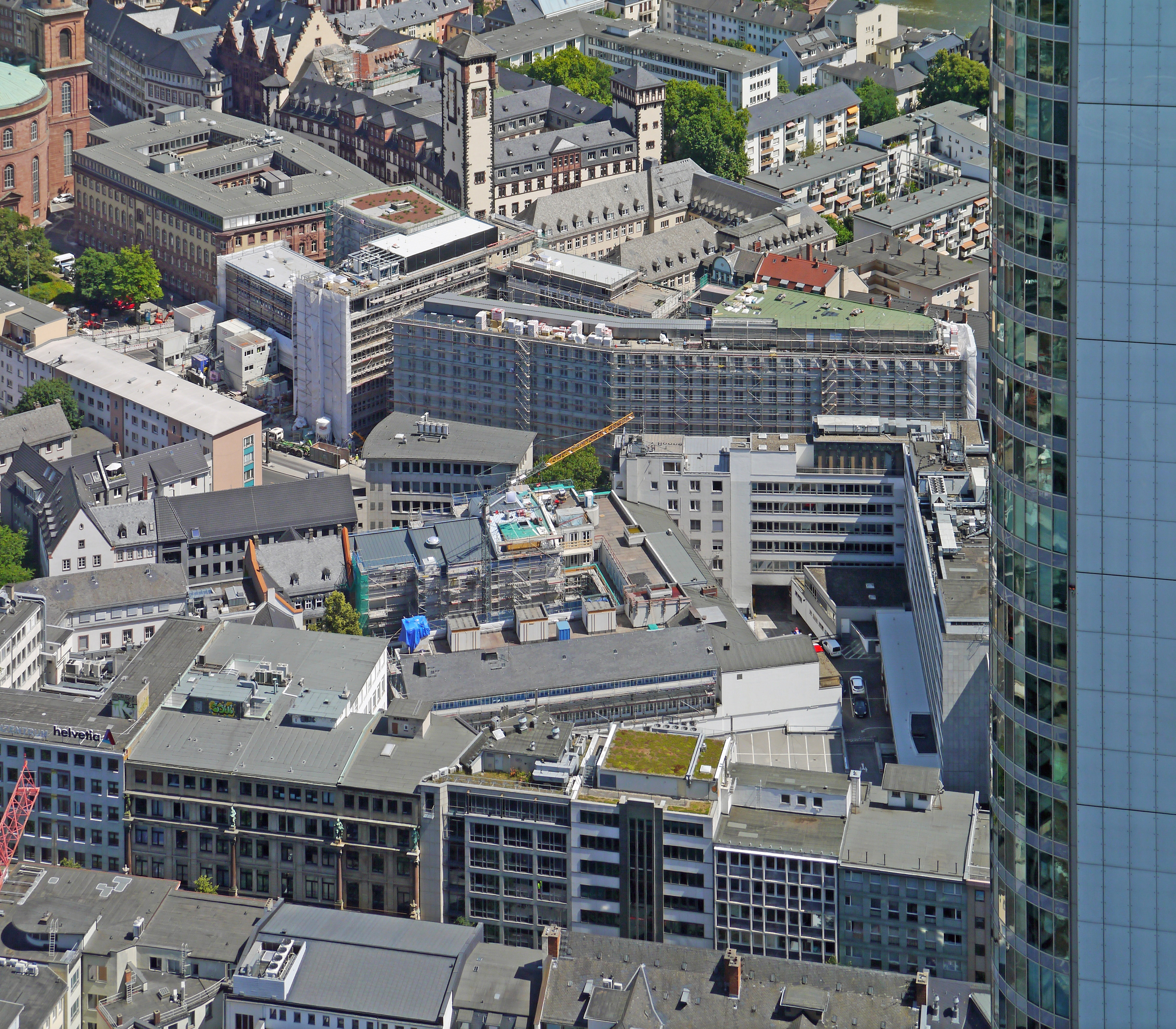 Die Baustellen von Deutschem Romantik-Museum (im Grossen Hirschgraben) und den Kornmarkt-Arkaden (auf dem Grundstück des Ehemaligen Bundesrechnungshofs), 2018 in Frankfurt am Main vom Maintower aus.